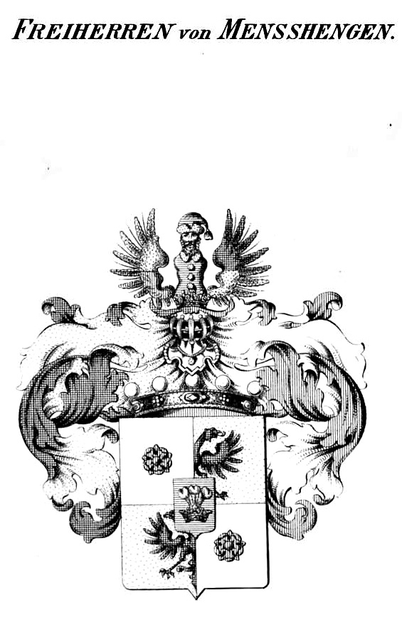 Wappen Mensshengen - Tyroff AT.jpg